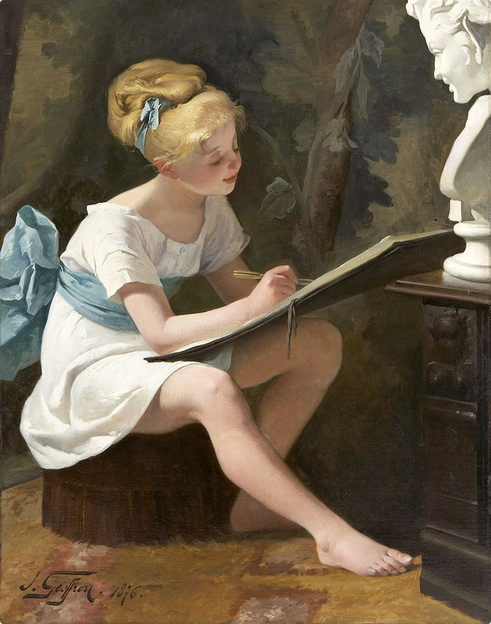 La leçon de dessin